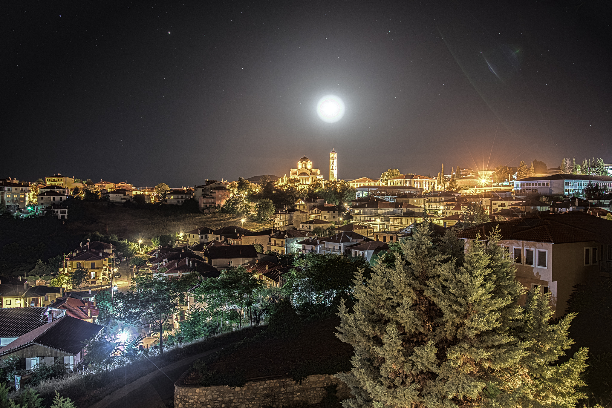 Παραδοσιακός οικισμός Σιάτιστα«Παραδοσιακός οικισμός Σιάτιστα»